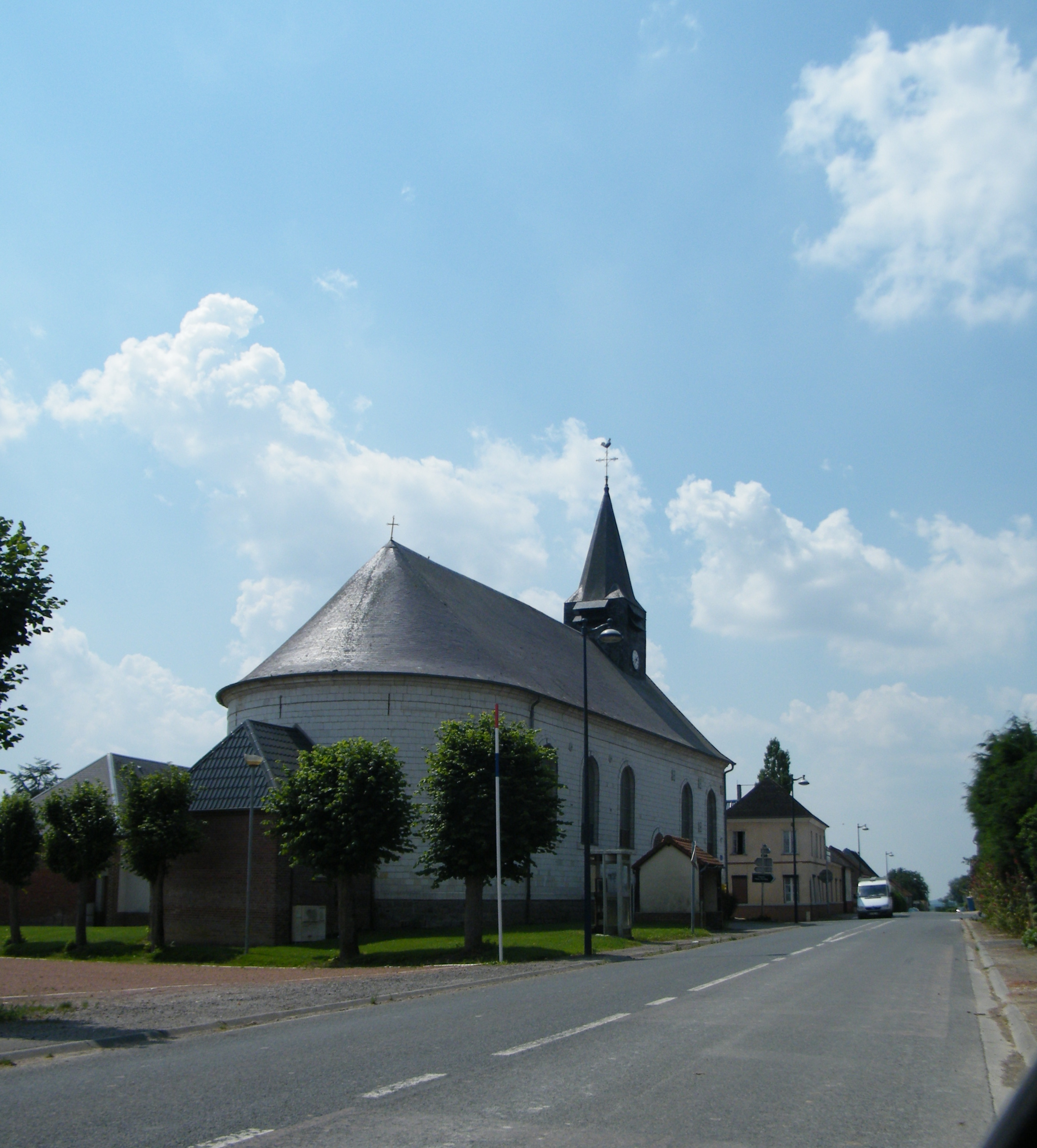 église.